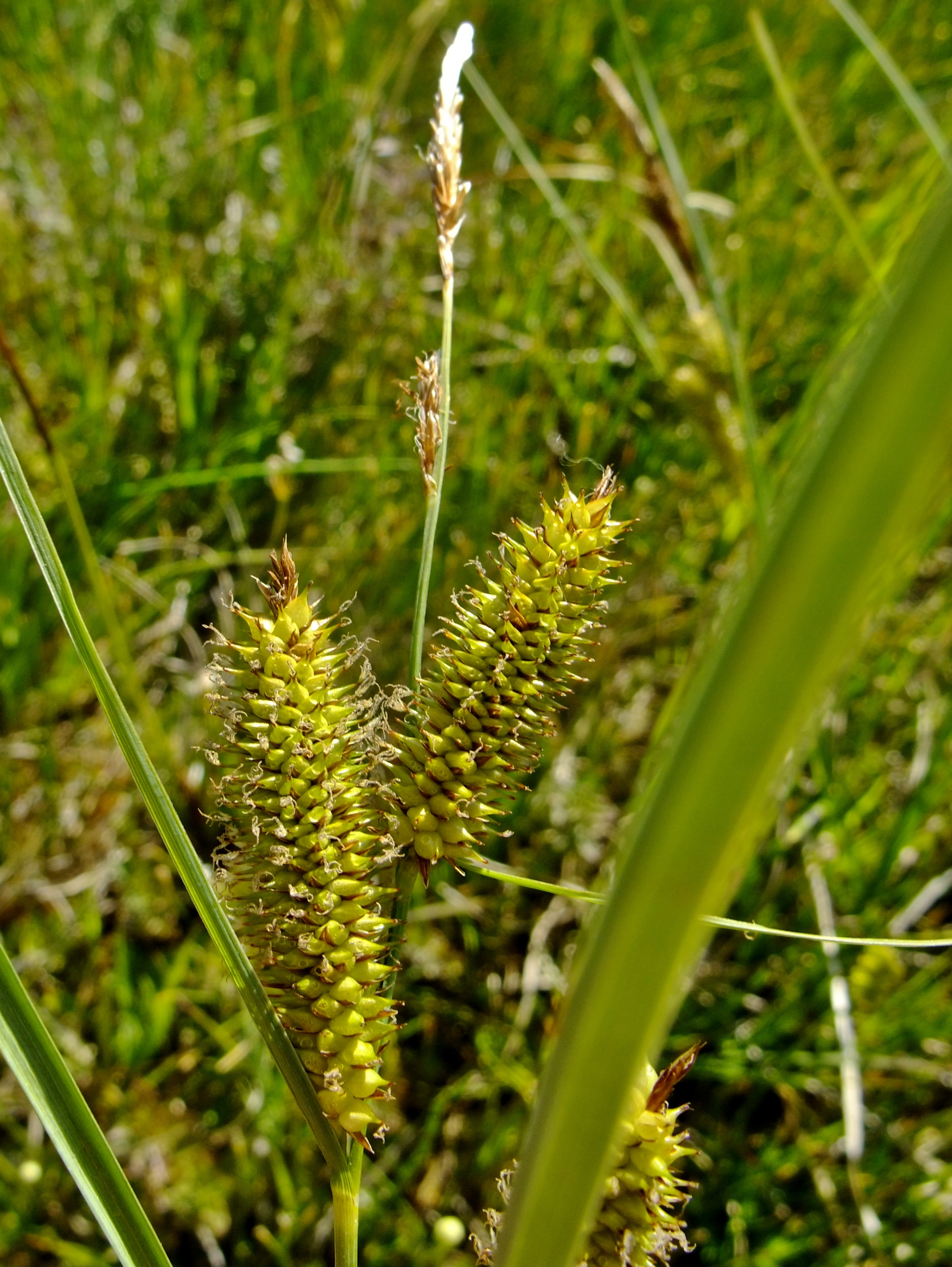 Carex rostrata